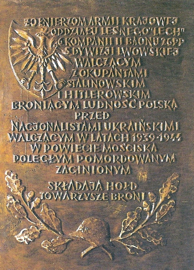 Tablica poświęcona pamięci żołnierzy 26 pp AK